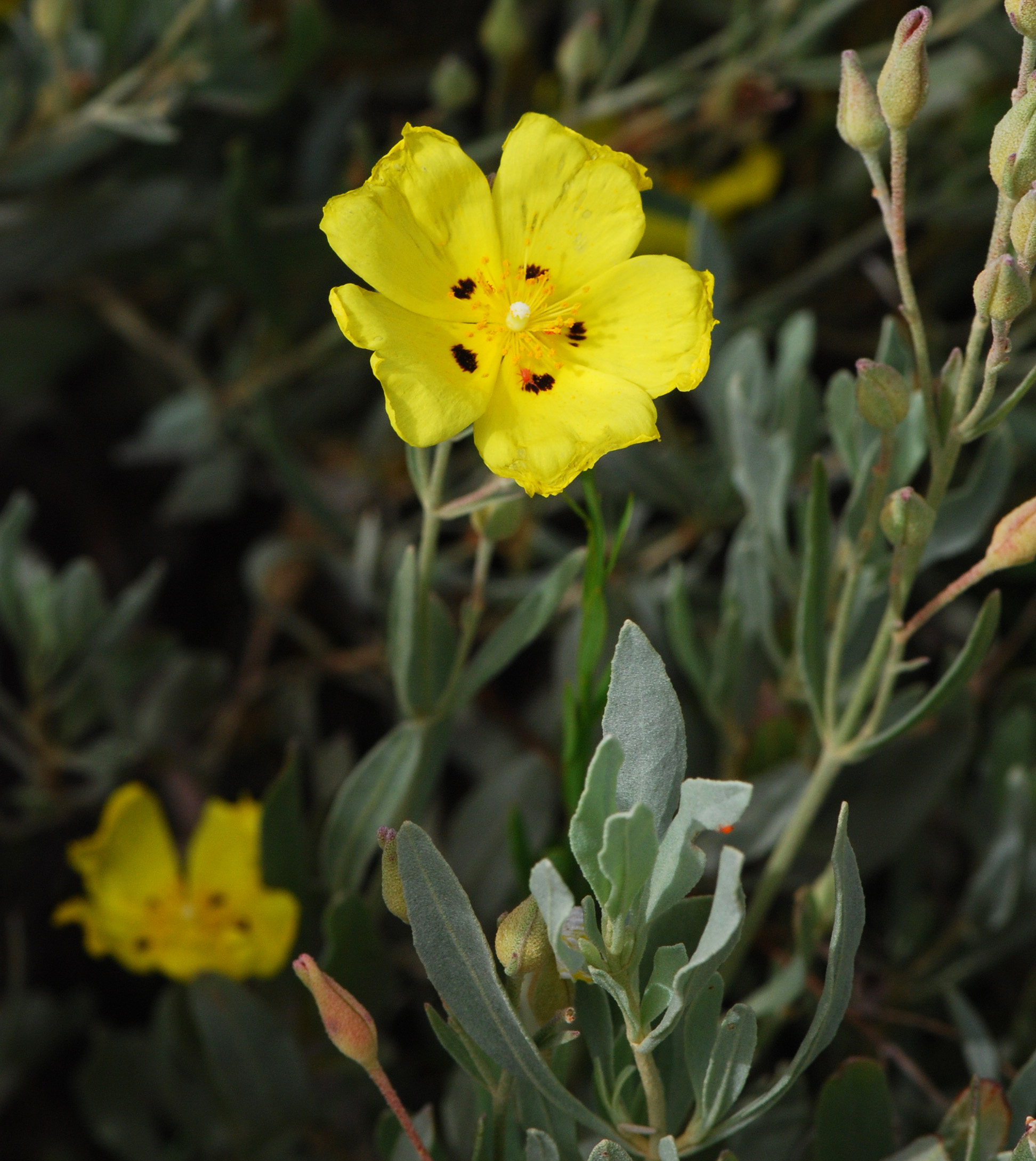 Halimium halimifolium, Hélianthème à feuilles d'arroche